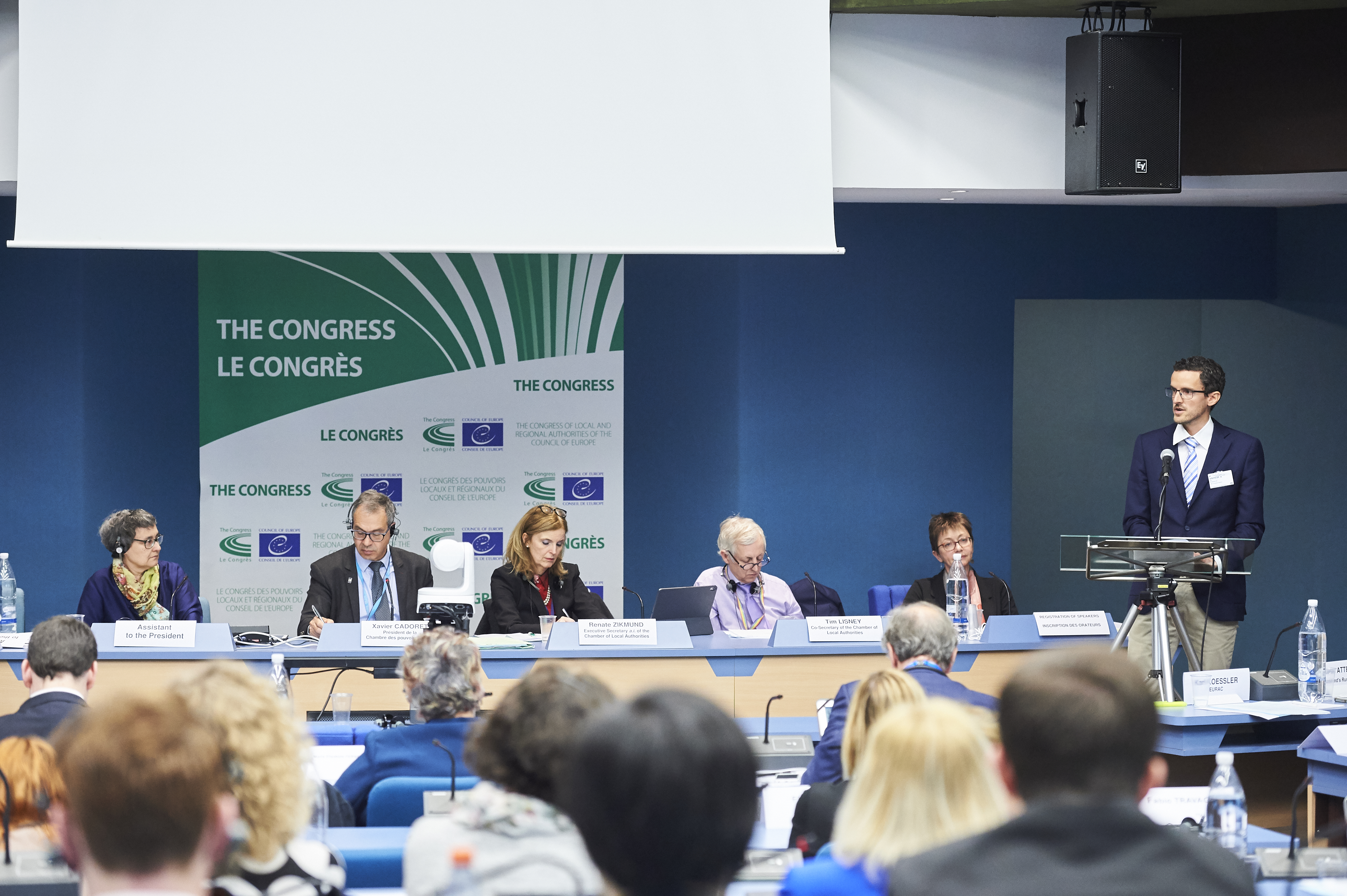 Chambre des pouvoirs locaux - Débat thématique : Fracture ville/campagne : quelles solutions pour un printemps des territoires ?